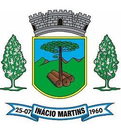 Brasão do município de Inácio Martins/PR